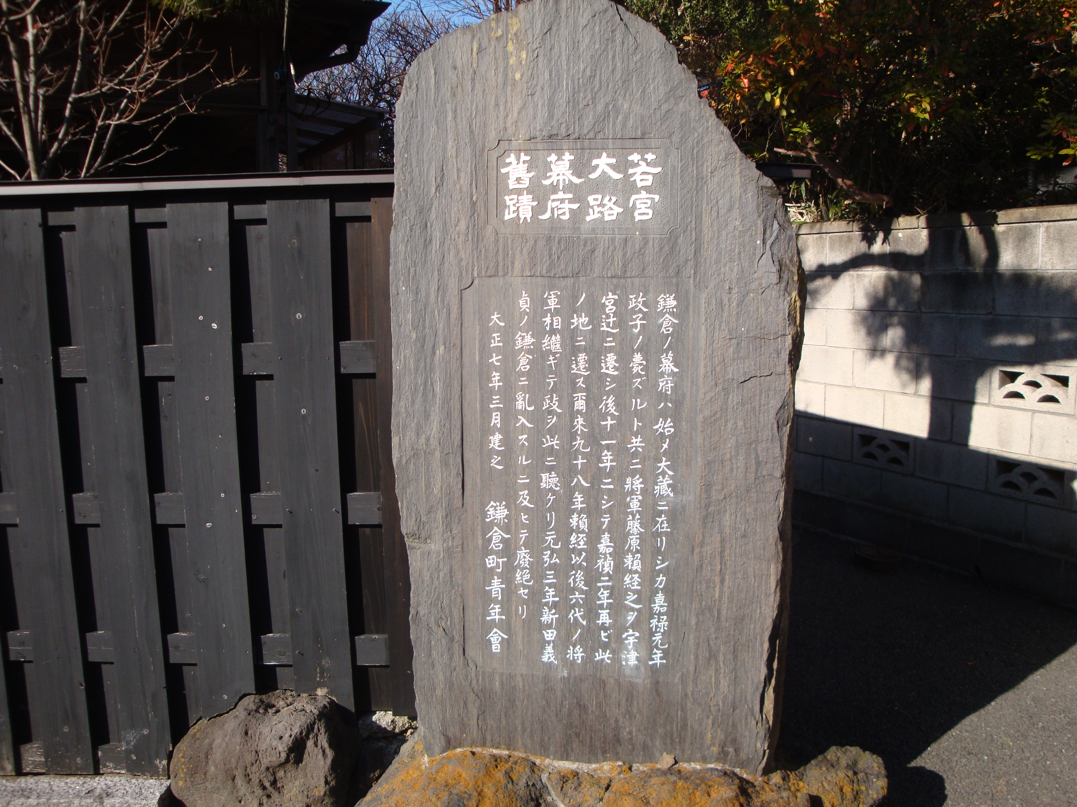 若宮大路幕府旧蹟 （神奈川県鎌倉市雪ノ下）